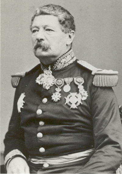 Paul Victor Jamin (1807-1868)